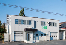 石田製本本社工場